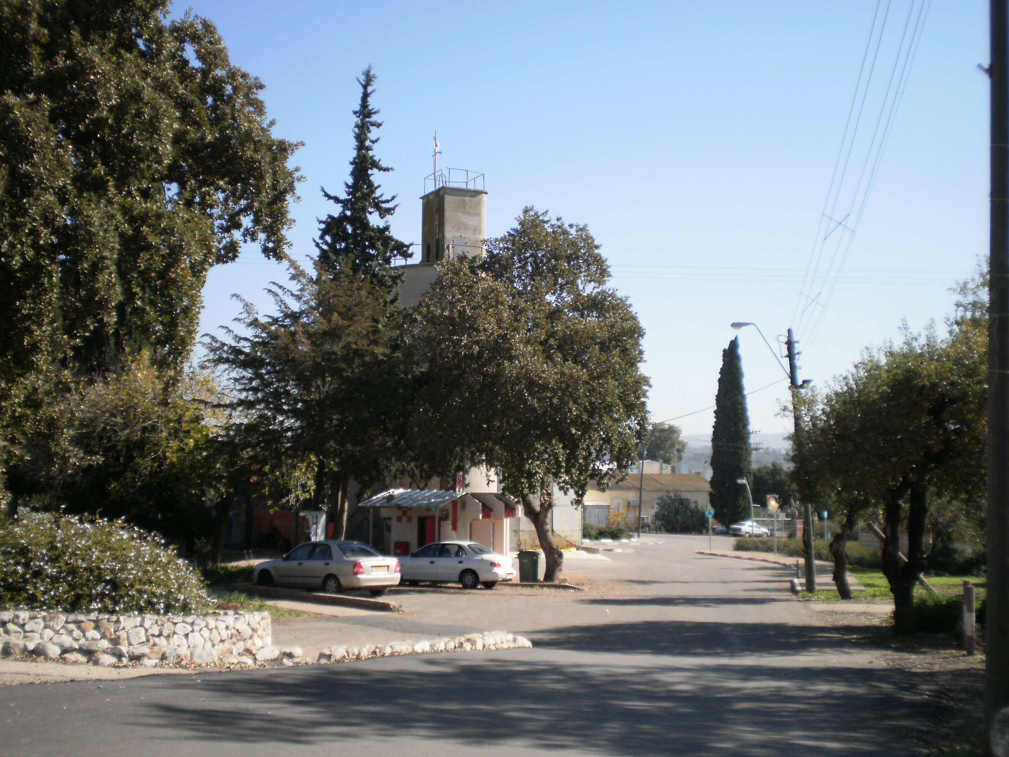 kibbutz Hasolelim, Israel קיבוץ הסוללים, ישראל